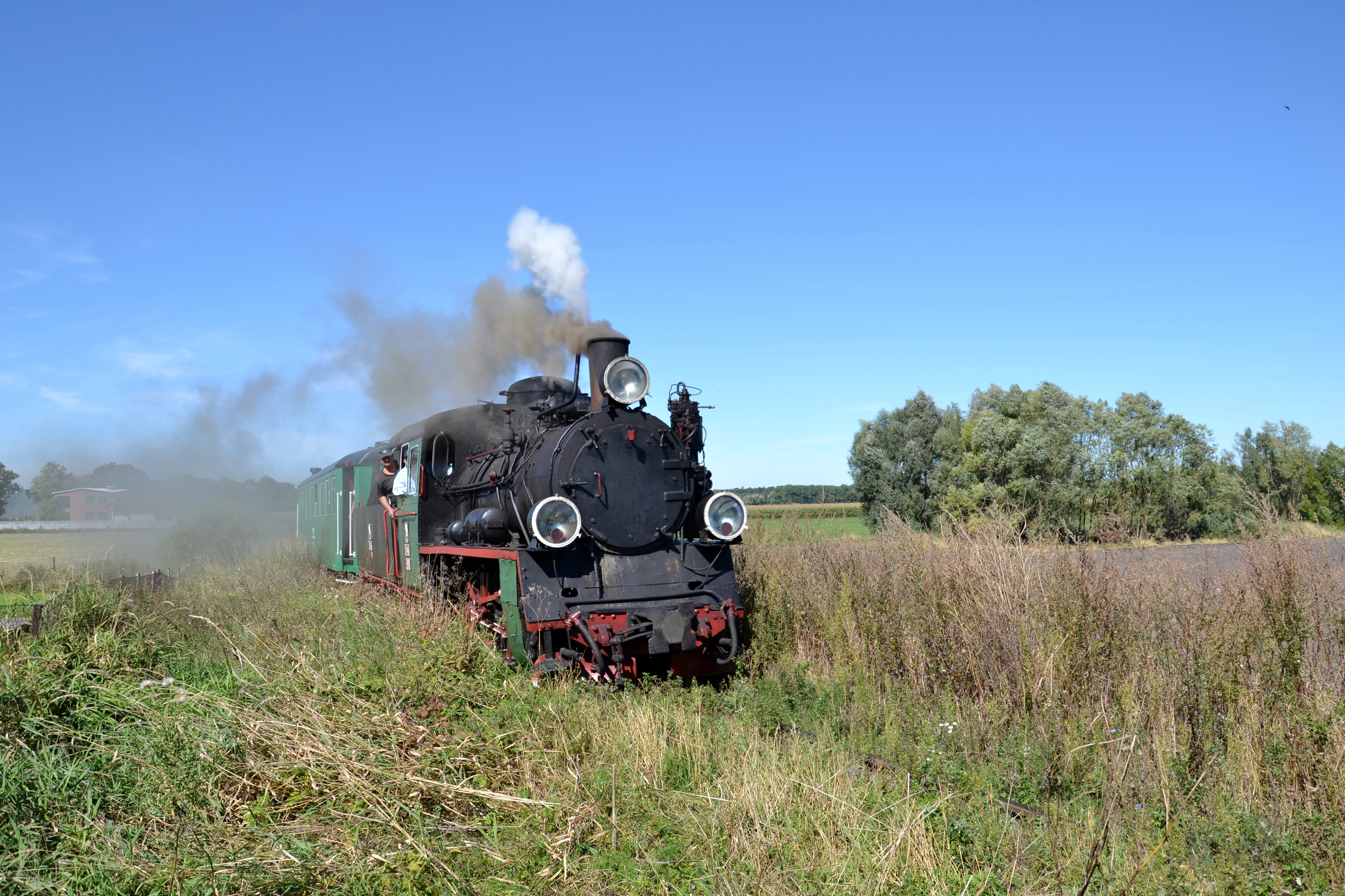 Px48-1919 za obecnie nieistniejącym przystankiem osobowym w Żelazkowie